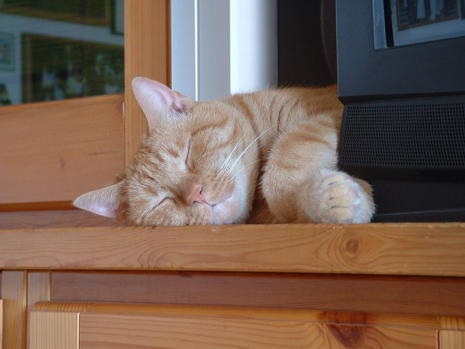 Foto di un gatto europeo a pelo corto di nome Clikky, età 6 anni, di proprietà dell'utente Sassospicco.